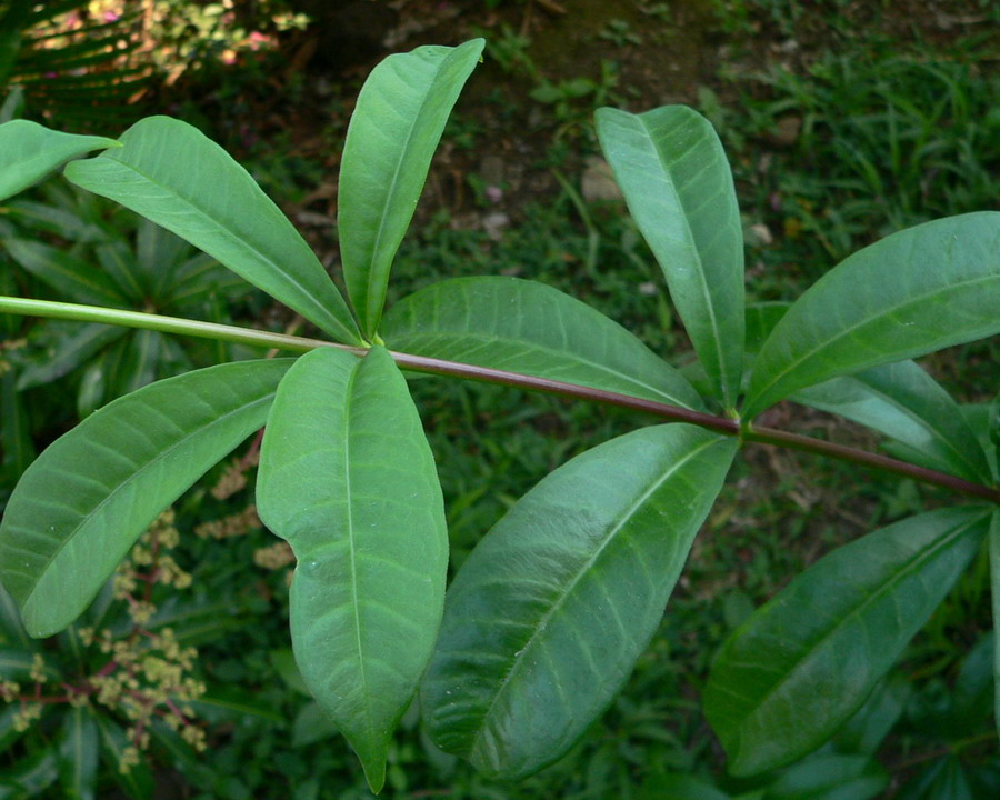 Allamanda cathartica, rameau, Guadeloupe